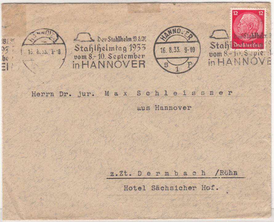 Adresseite des von Joseph Berliner ('J.B.) an „Herrn Dr. jur. Max Schleissner“ adressierten Briefumschlages vom 16. August 1933. Schleisner hielt sich seinerzeit offenbar im Hotel Sächsischer Hof in Dermbach in der Rhön auf. Der Briefumschlag mit einer Briefmarke aus der Hindenburgserie und mit einem Stempel versehen, der für den ersten sogenannten Stahlhelmtag in Hannover vom 8. bis 10. September 1933 wirbt ...